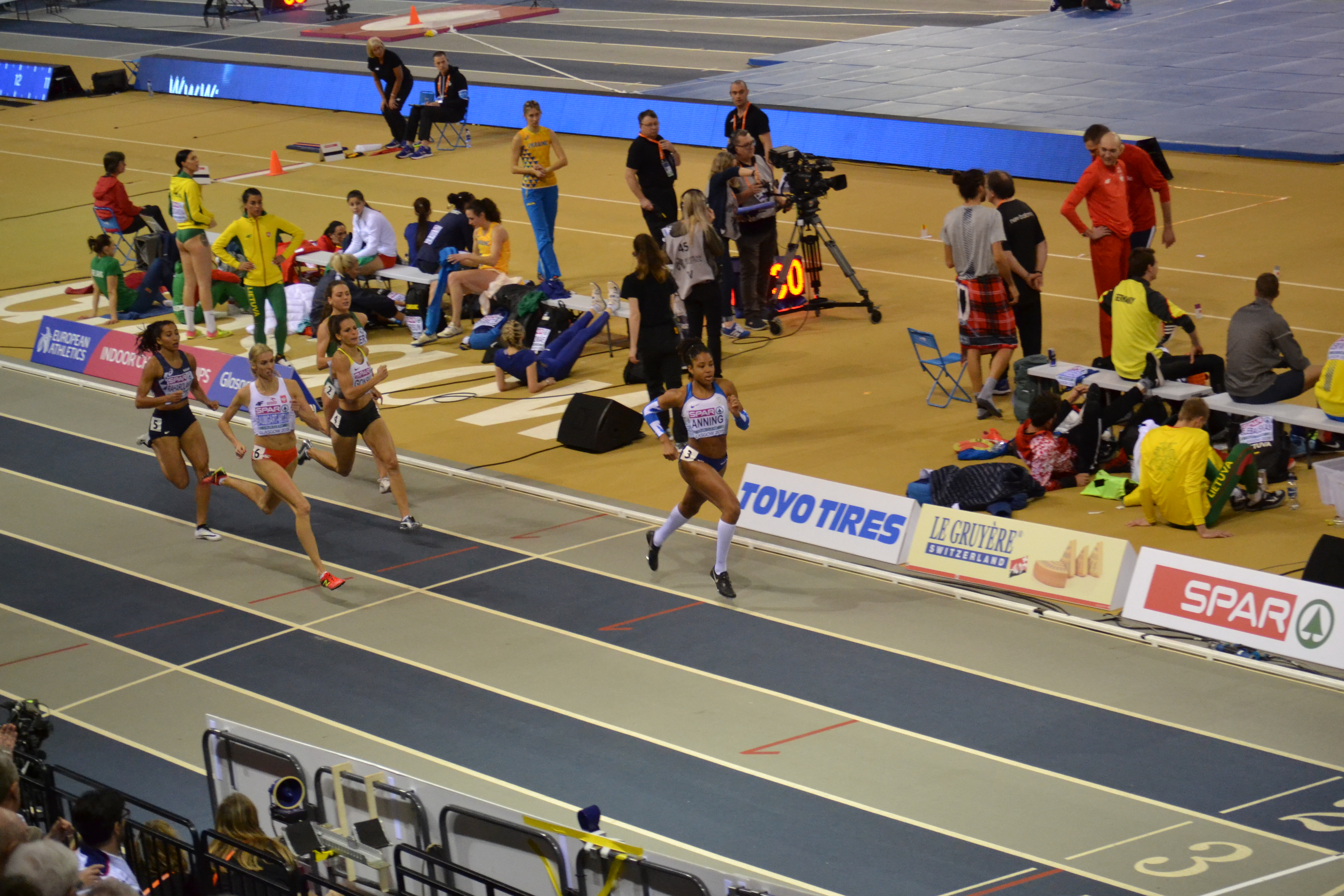 Womens 400m